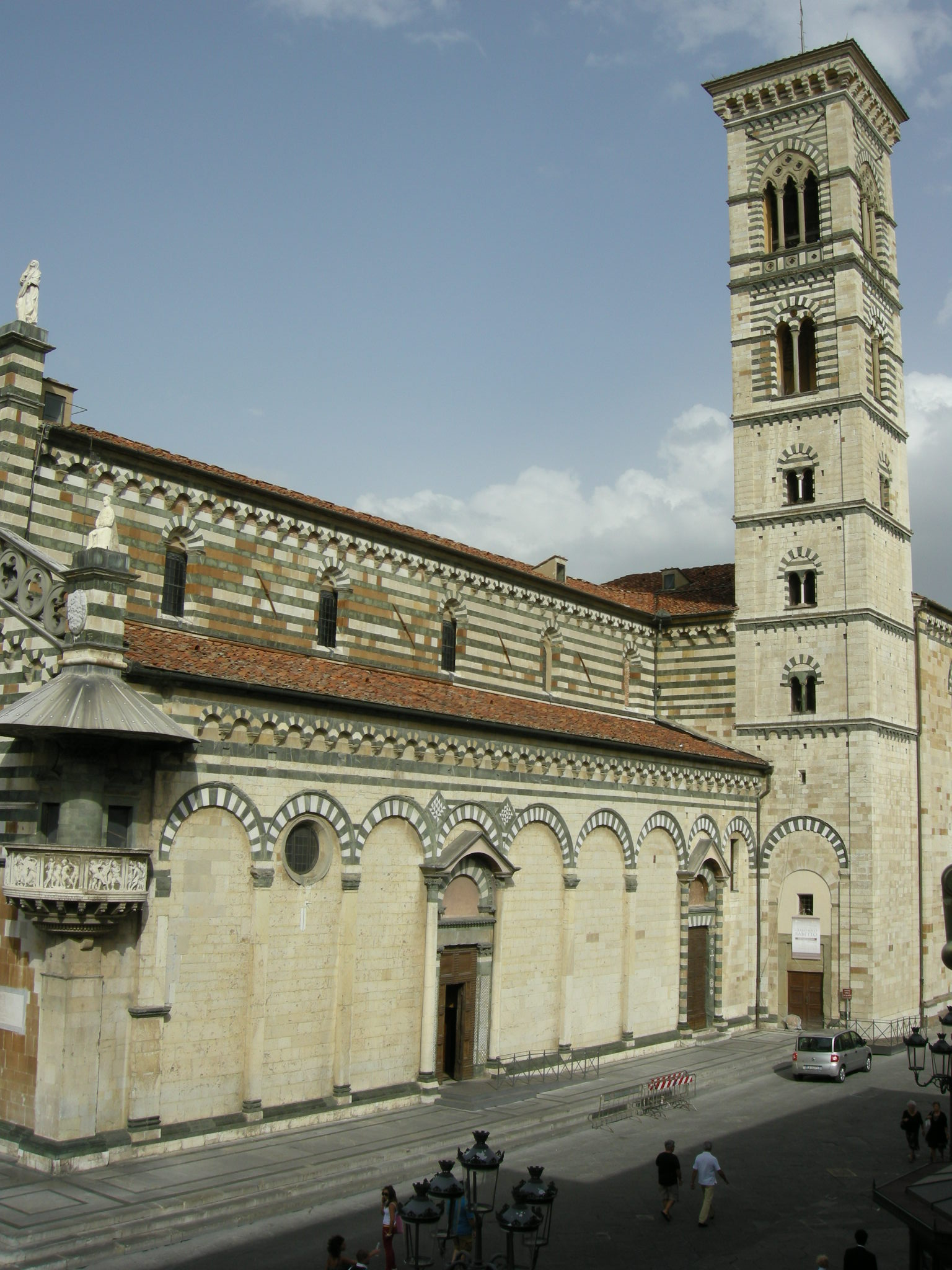 Campanile del duomo di prato